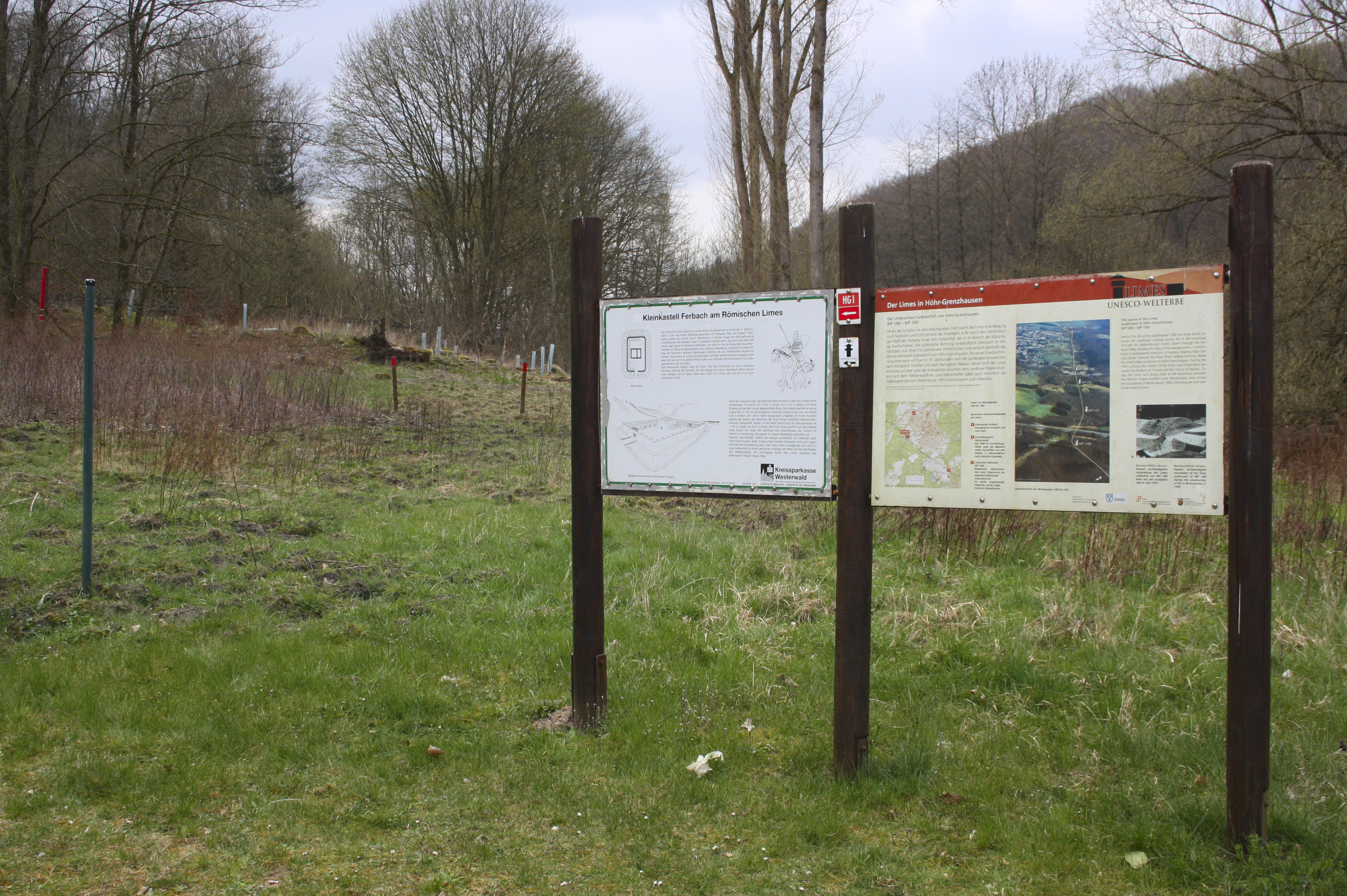 Bodendenkmal Kleinkastell Ferbach, Höhr, Höhr-Grenzhausen, Westerwaldkreis, Rheinland-Pfalz, Deutschland